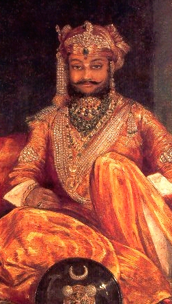 Tukoji Rao Holkar, Maharaja of Indore